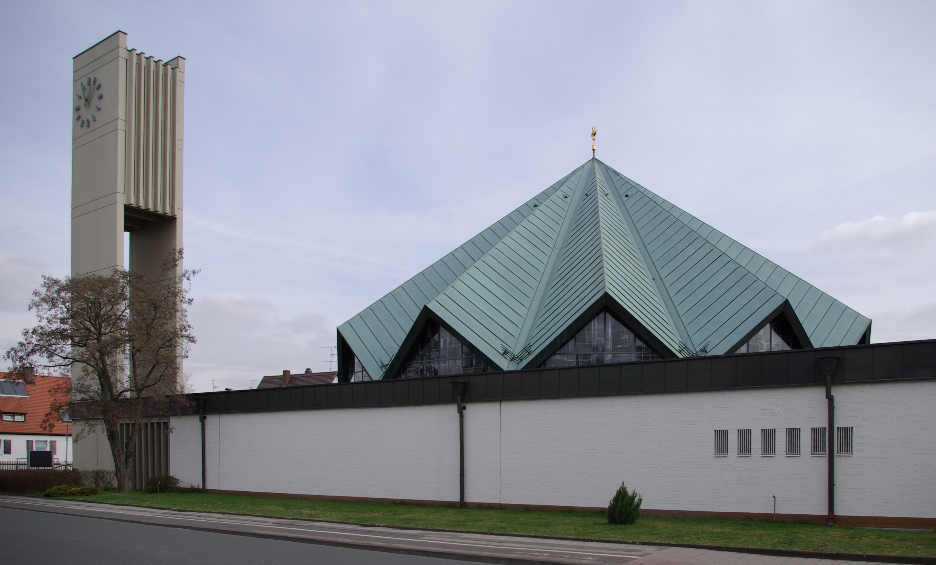 Kirche St. Heinrich im Erlanger Ortsteil Alterlangen